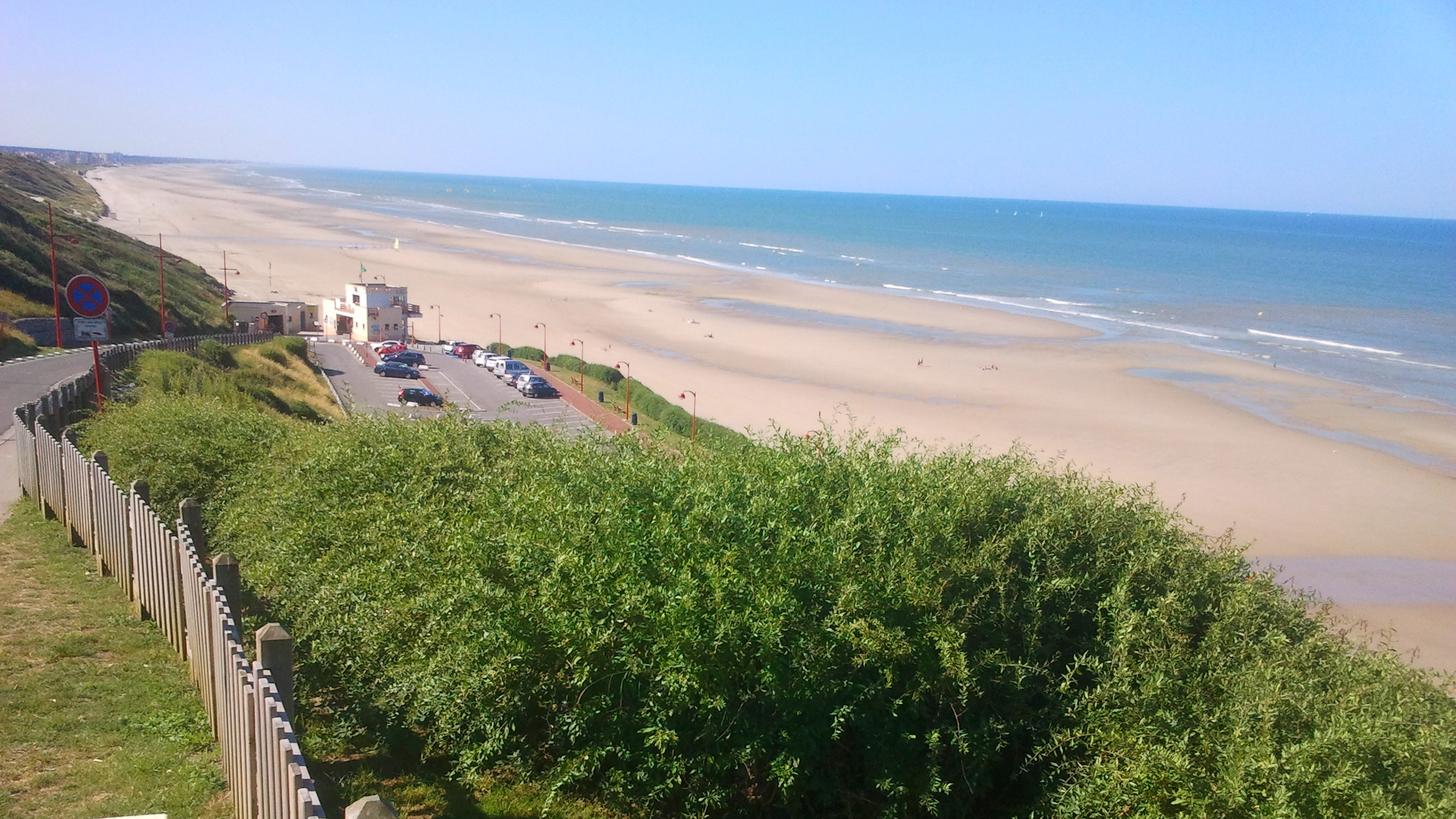 Vue de la plage sud d'Équihen-Plage (62)